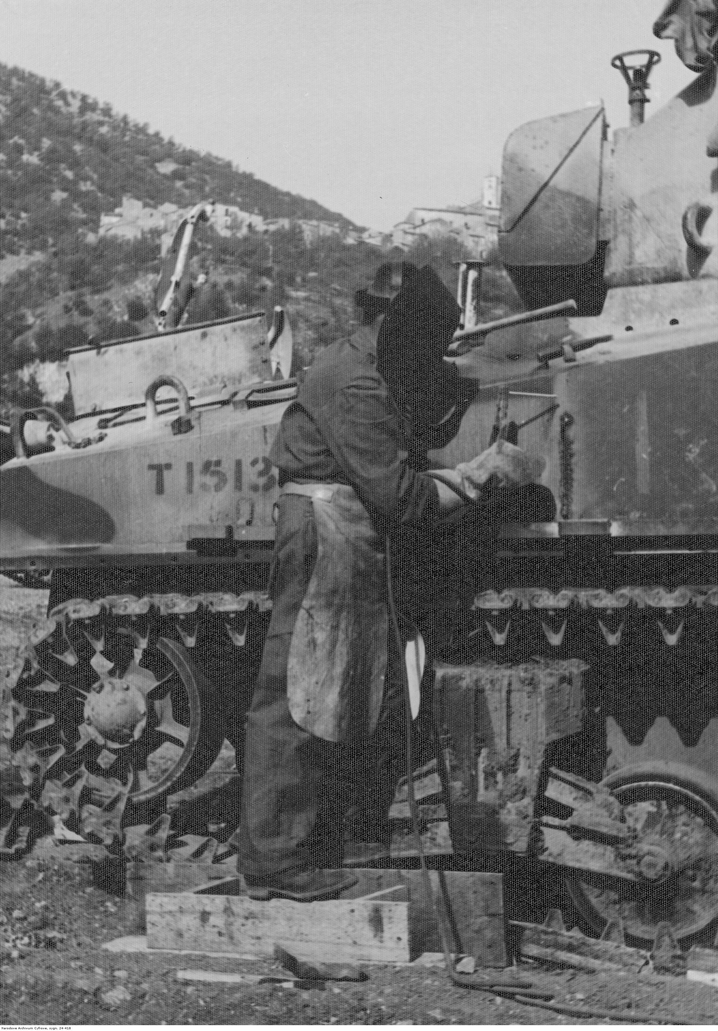 Samodzielna 2 Brygada Pancerna we Włoszech. Przygotowanie czołgów M4 Sherman z 6 Pułku Pancernego "Dzieci Lwowskich" do bitwy o Monte Cassino poprzez dospawanie dodatkowych płyt pancernych. Archiwum Fotograficzne Tadeusza Szumańskiego. Sygnatura: 24-418